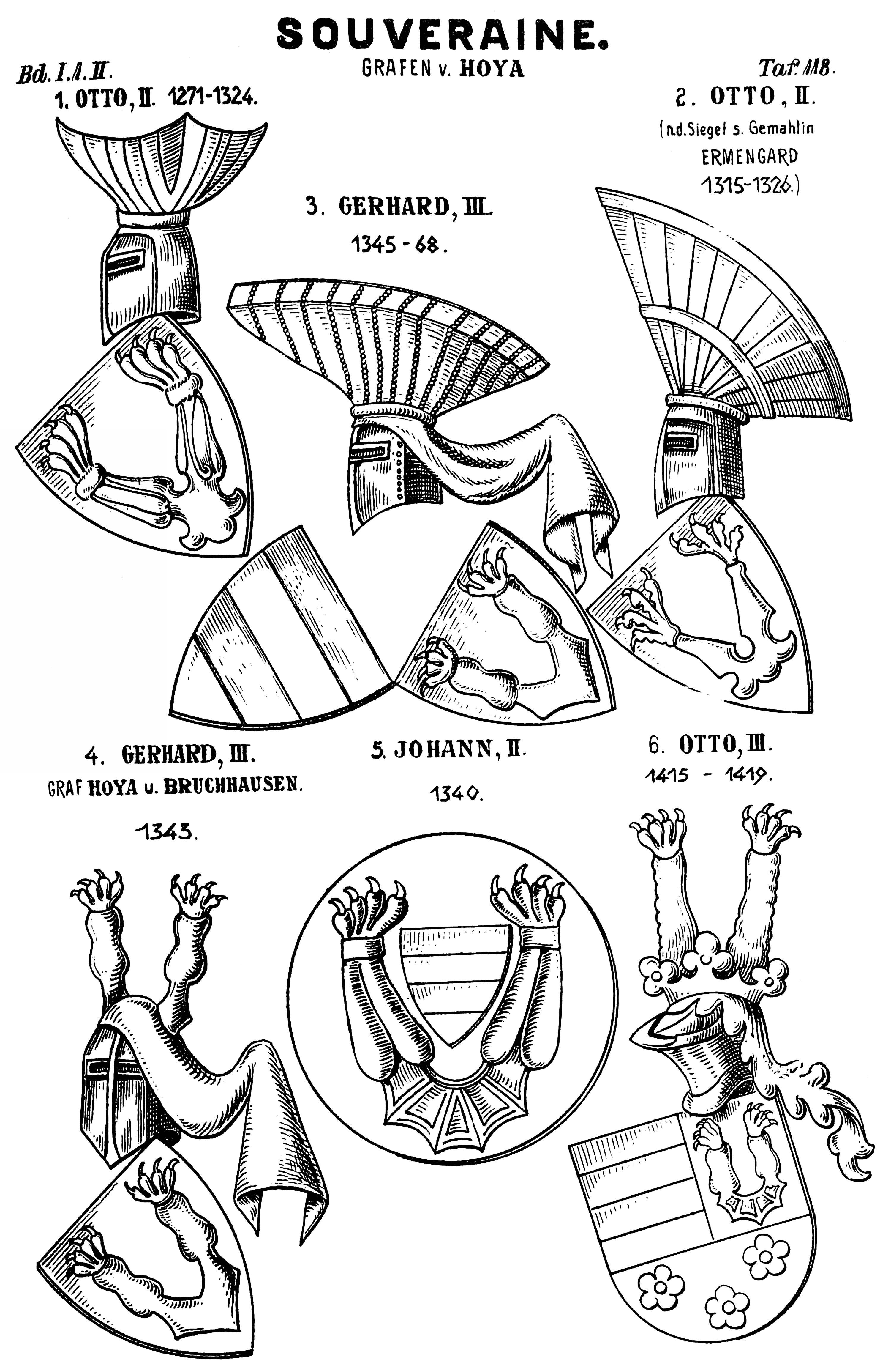 Wappen derer Grafen von Hoya